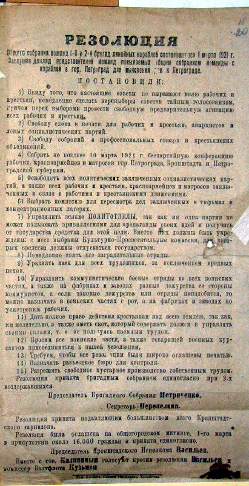 Kronstädter Matrosenaufstand: Resolution der Vollversammlung der Mannschaften der ersten und zweiten Brigade der Schlachtschiffe Petropawlowsk und Sewastopol.